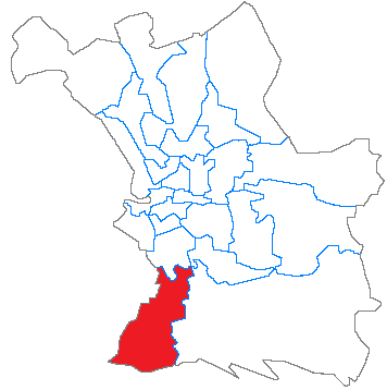 Situation du canton dans la ville de Marseille